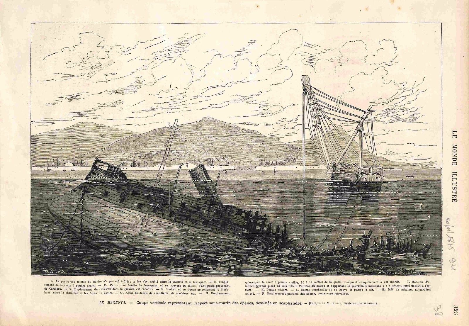 Le Magenta en rade de Toulon, Le monde illustré 20 nov 1875, Fortuné Meaulle